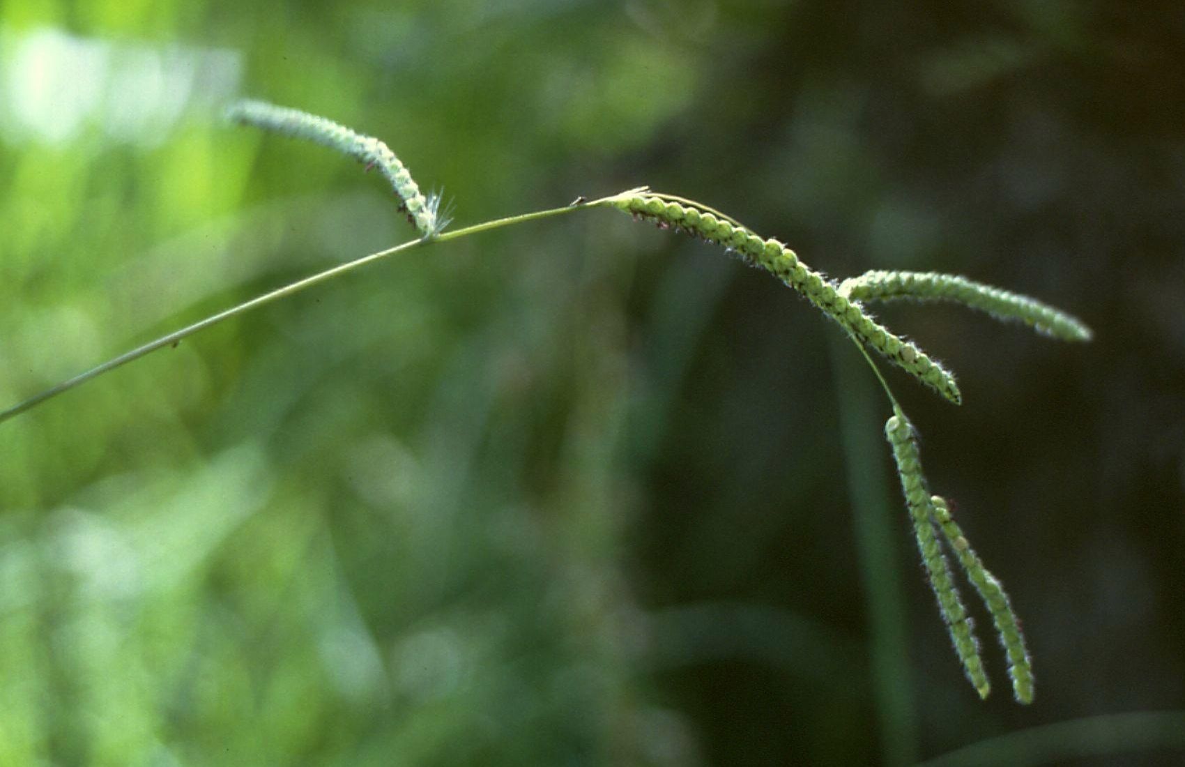 Paspalum dilatatum, Süßgräser (Poaceae) - Argentinien/Argentina, Mendoza, Parque General San Martín (Prov. Mendoza)